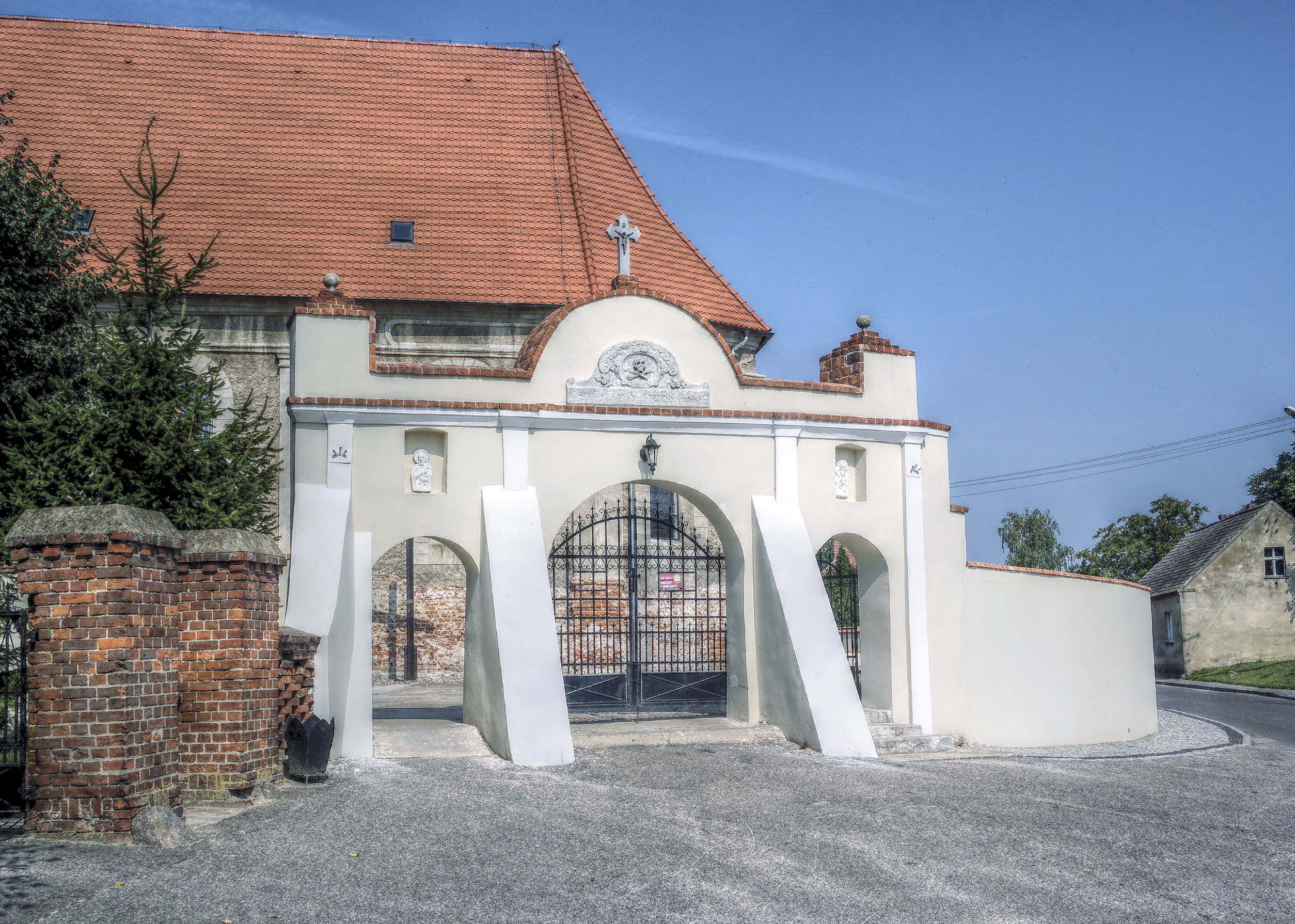 ogrodzenie kościoła pw św Marcina, Mchy, województwo wielkopolskie, HDR foto